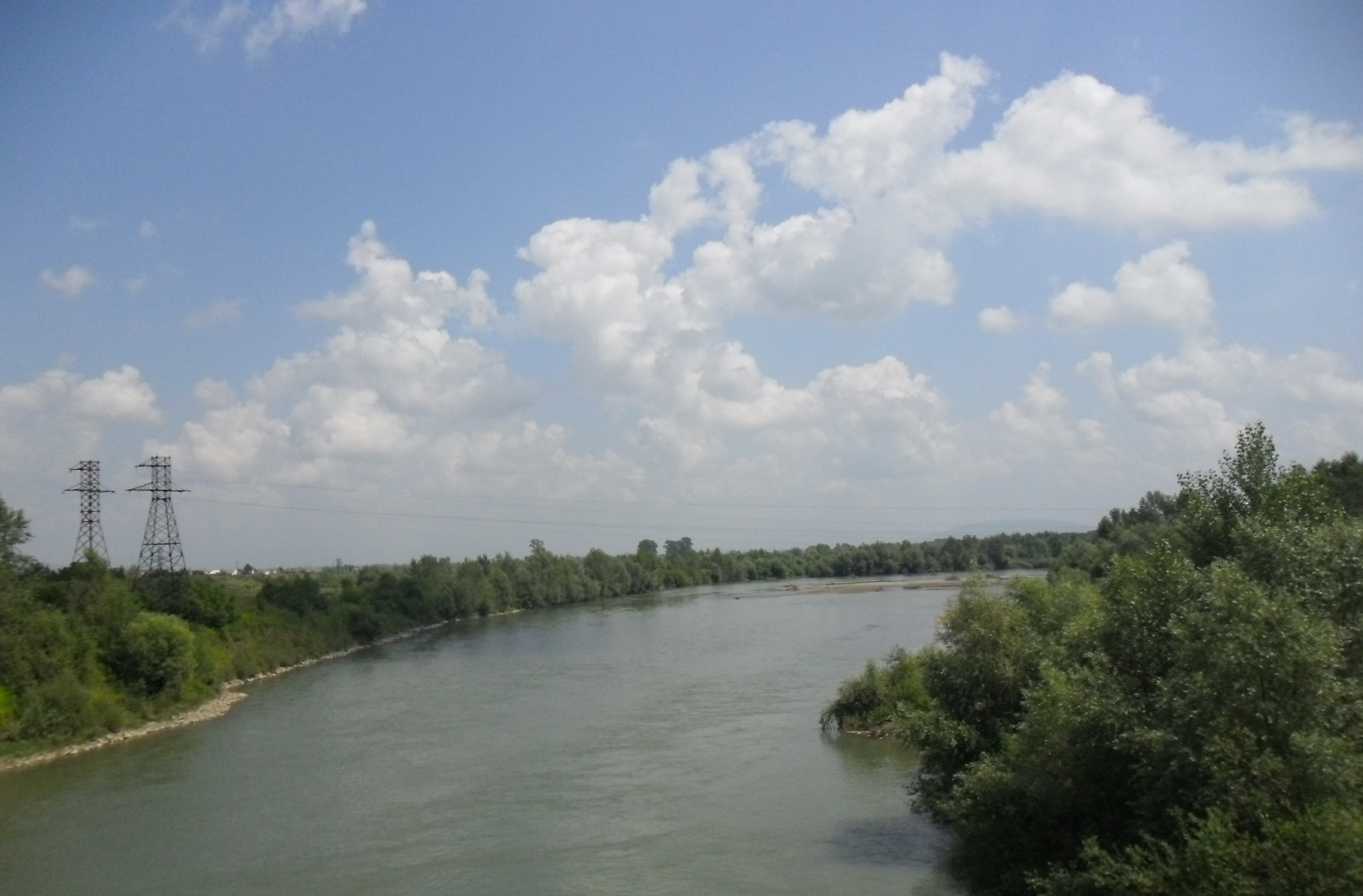 A Tisza Tiszaújlaknál (Kárpátalja, Ukrajna)